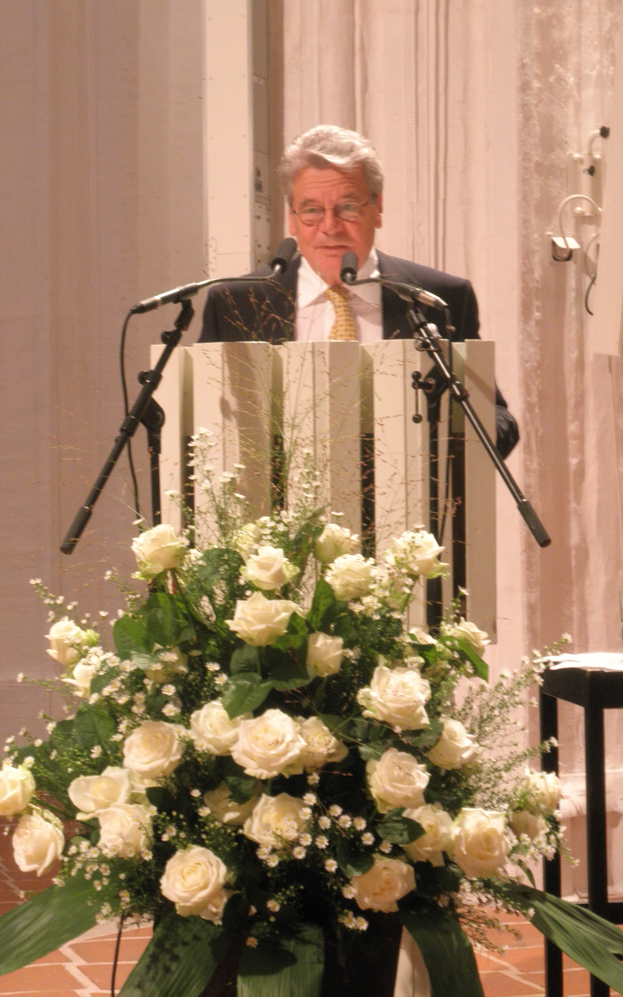 Joachim Gauck dum prelego la 9-an de oktobro 2011 en Lubeko, kadre de psikoterapiista konferenco